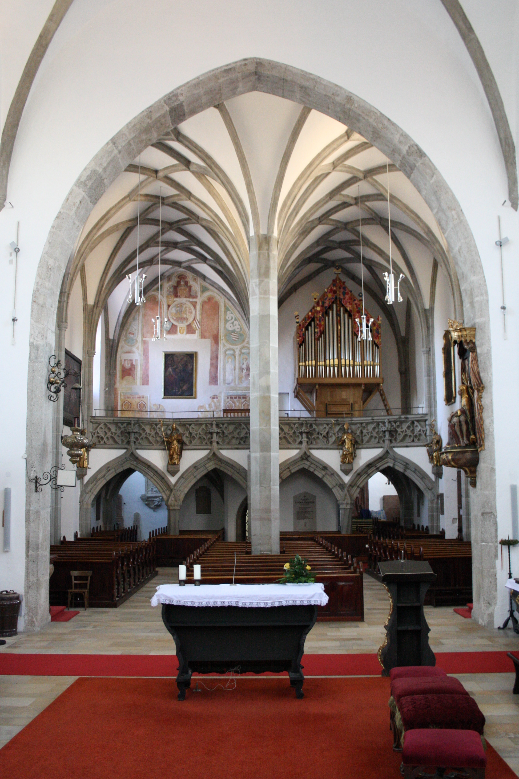 Innenansicht der oberösterreichischen Wallfahrtskirche Maria Schöndorf Richtung Empore.